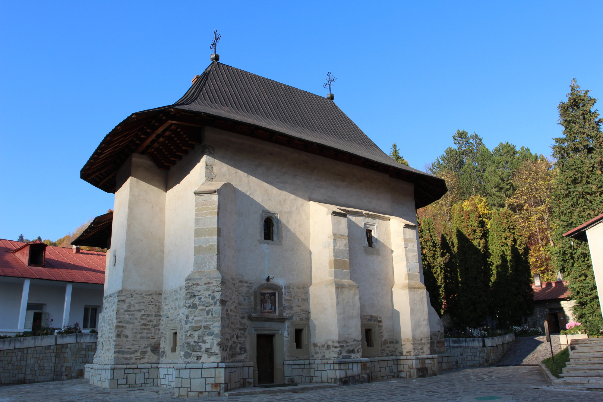 Mănăstirea Pângărați